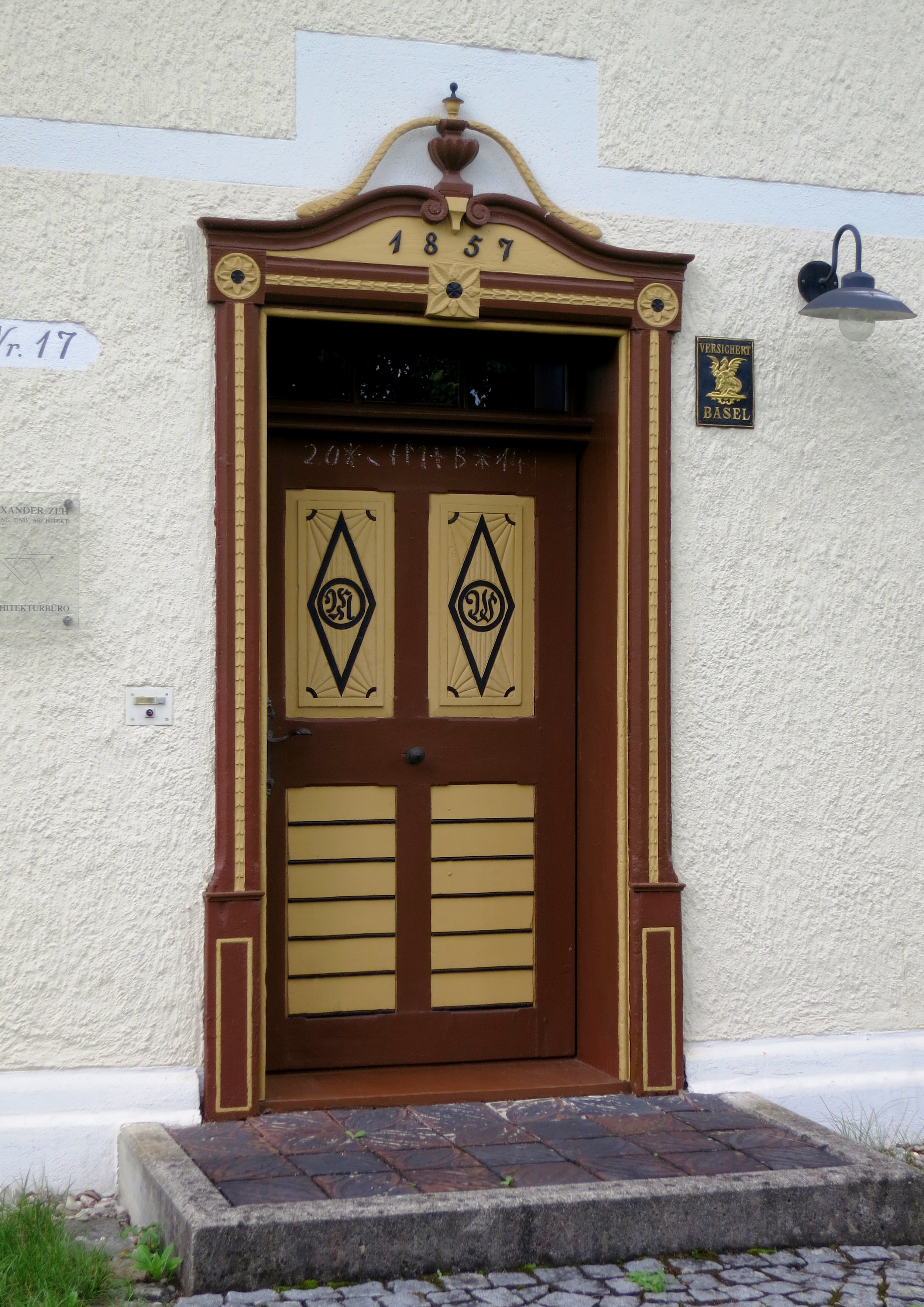 Ehemaliges Bauernhaus in Jesenwang, Mammendorfer Straße 17 - Türe aus SüdOst